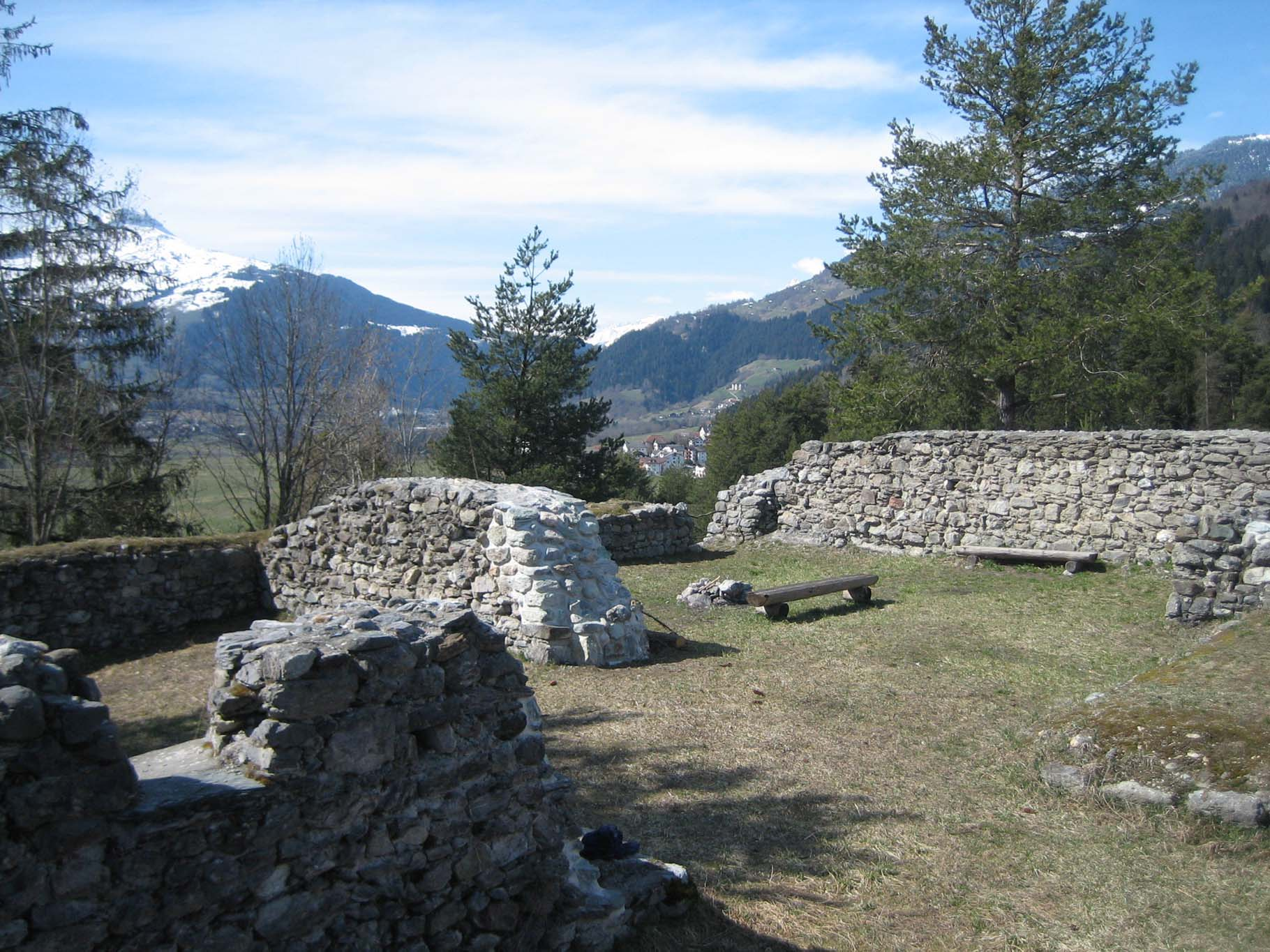 Ruine Schiedberg